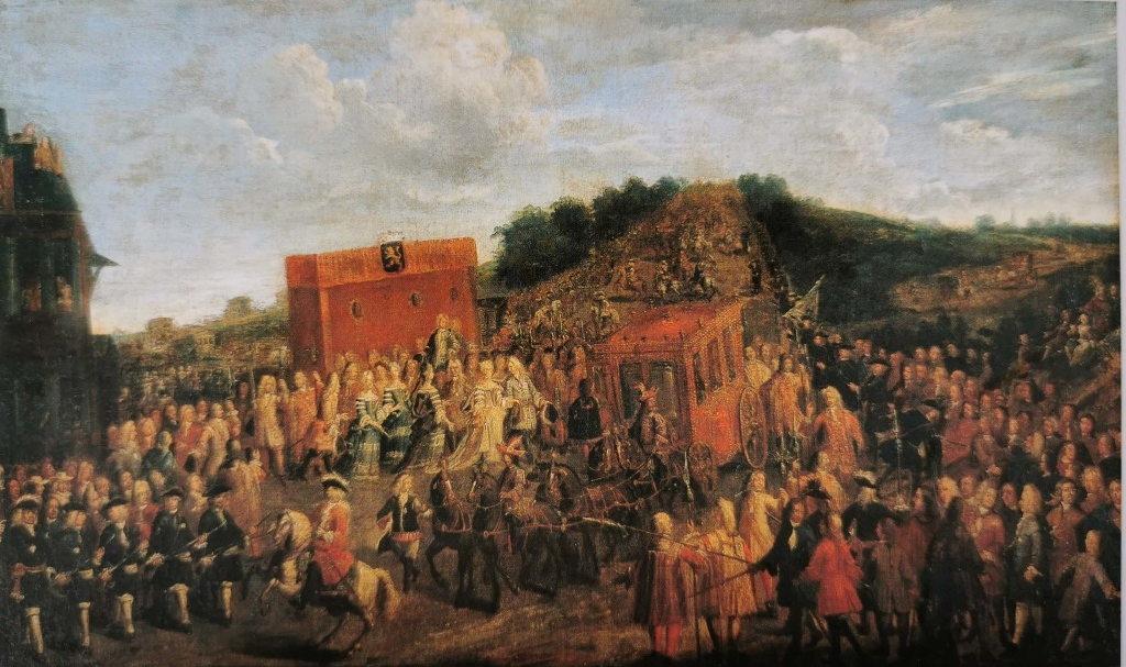 Andreas Martin, De intrede te Brussel van aartshertogin Maria-Elisabeth (KMSKB)